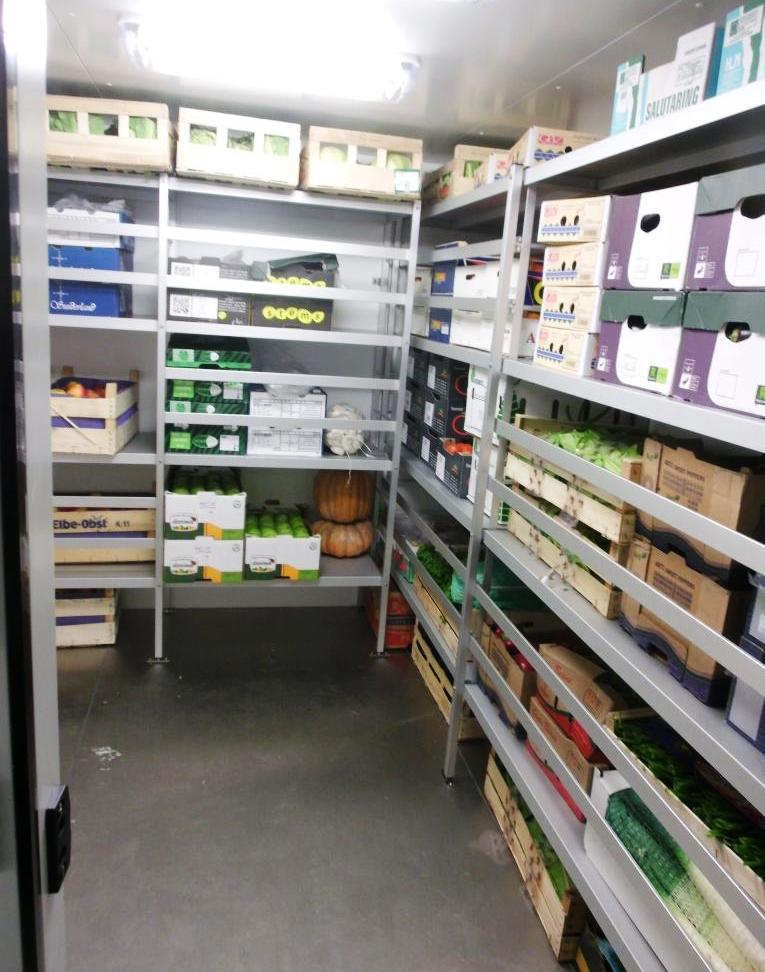 Blick in den Gemüseraum